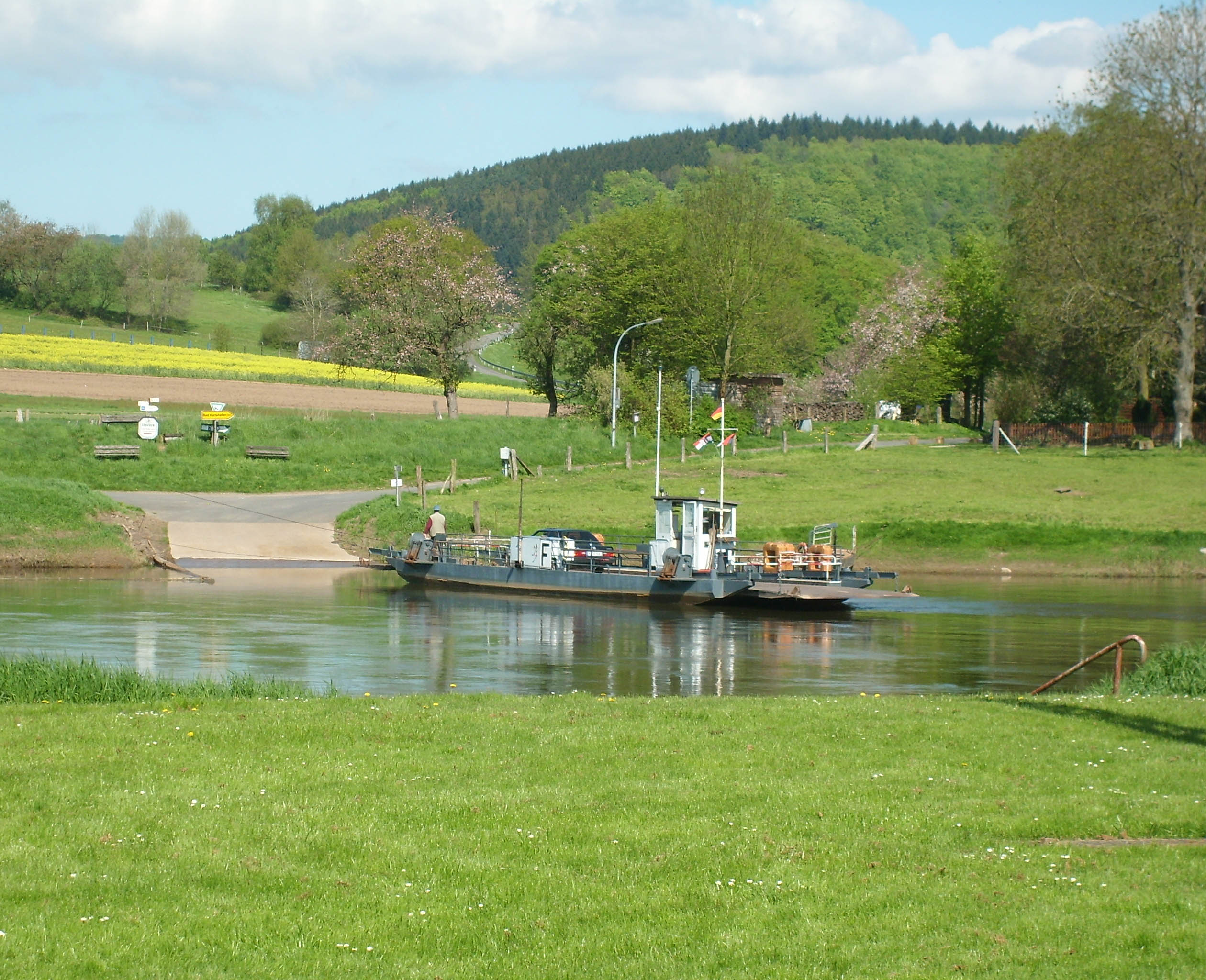 Fähre Lippoldsberg.